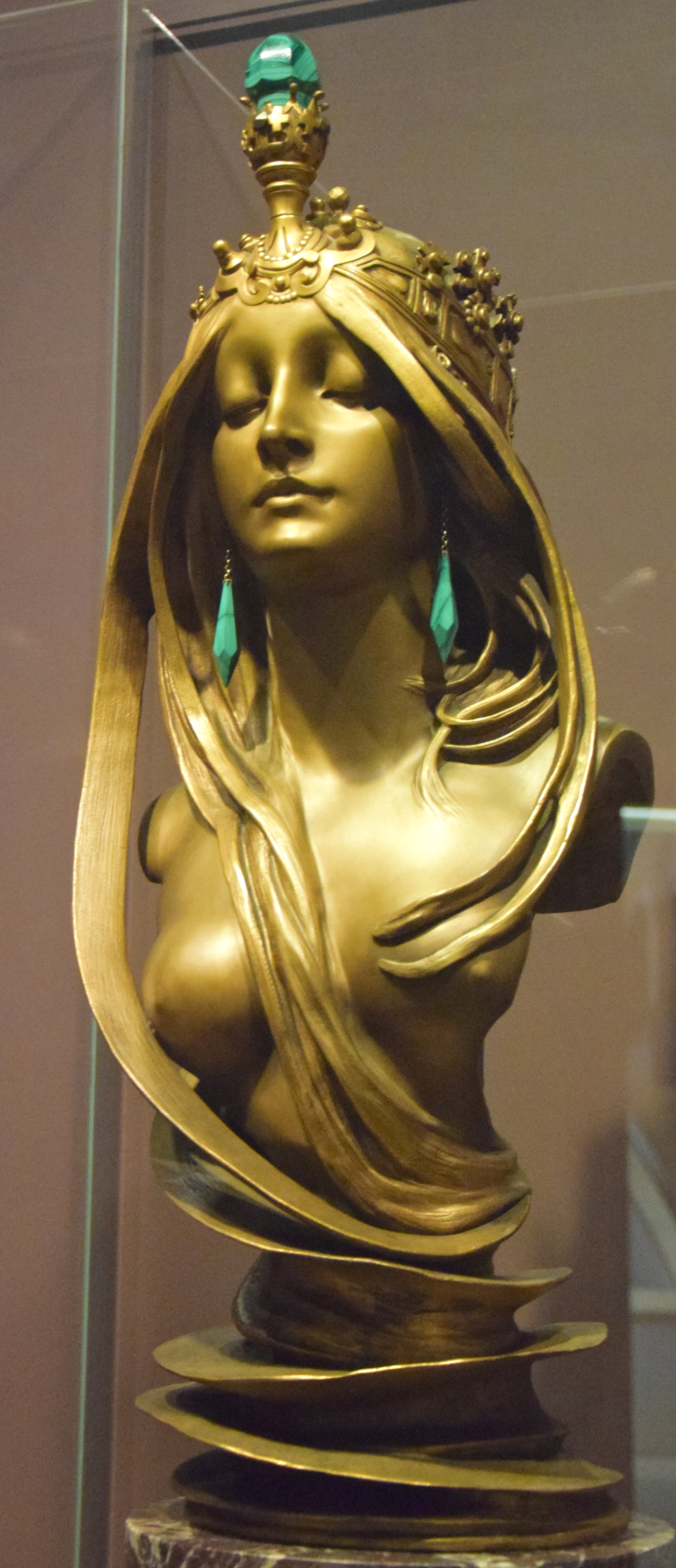 La natura - Alfons Mucha